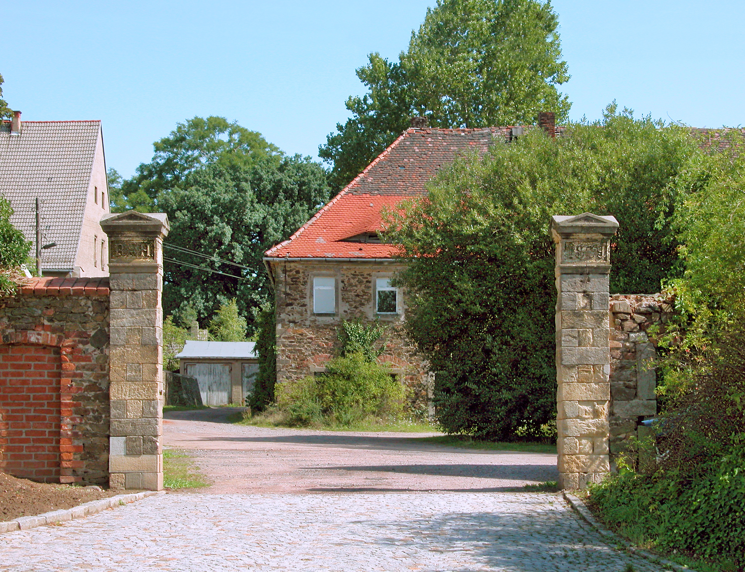 17.08.2008 01665 Miltitz (Klipphausen), Am Rittergut: Rittergut und Schloß Miltitz. Hoftor zum Rittergut. Die Kopfsteine haben die Eintragungen "R. v. H." und "1879". [DSCN33775.TIF]20080817100DR.JPG(c)Blobelt